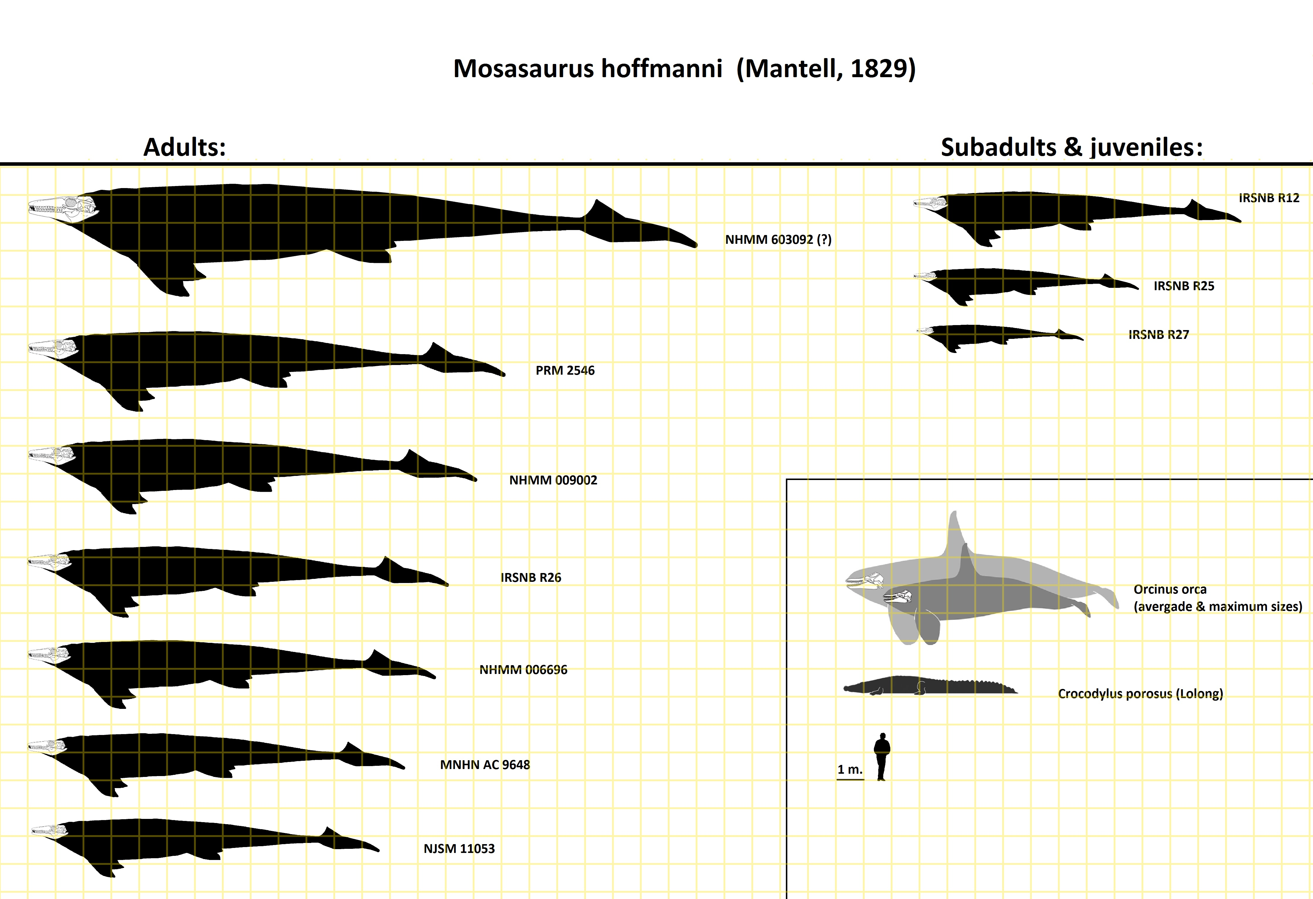 Сравнение размеров различных образцов мозазавров Гоффмана.